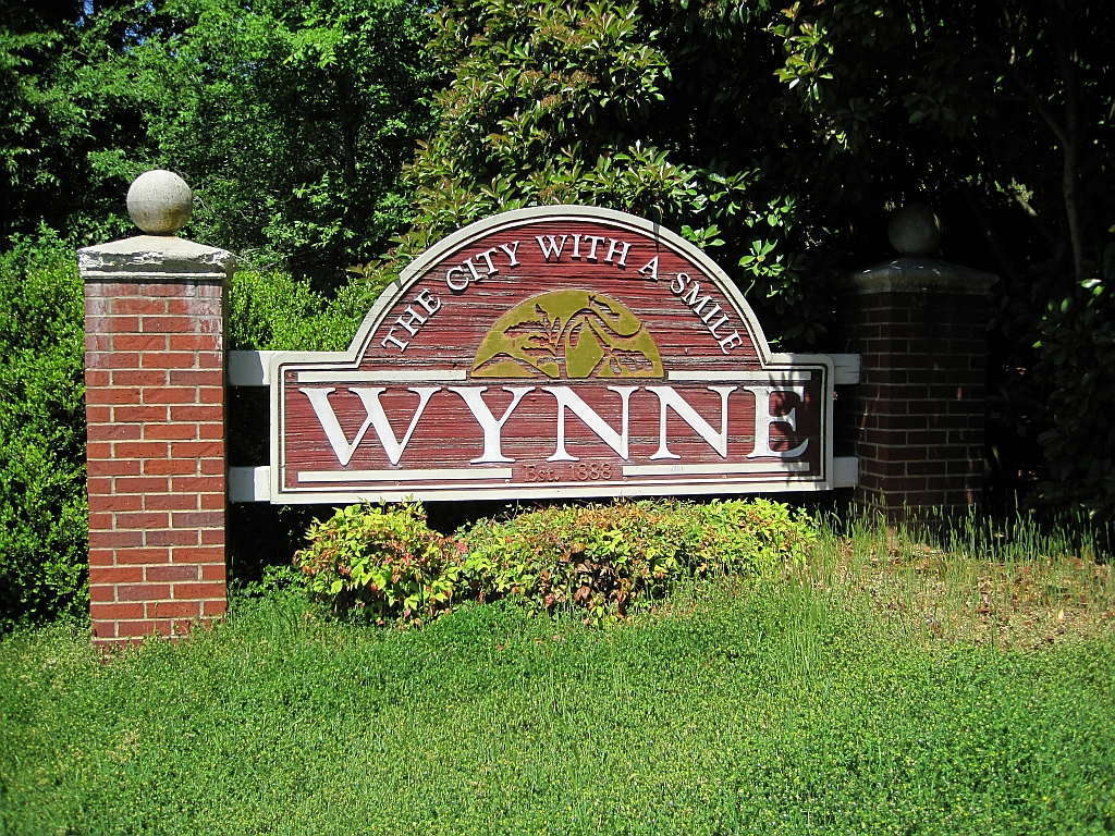 Wynne, Arkansas.